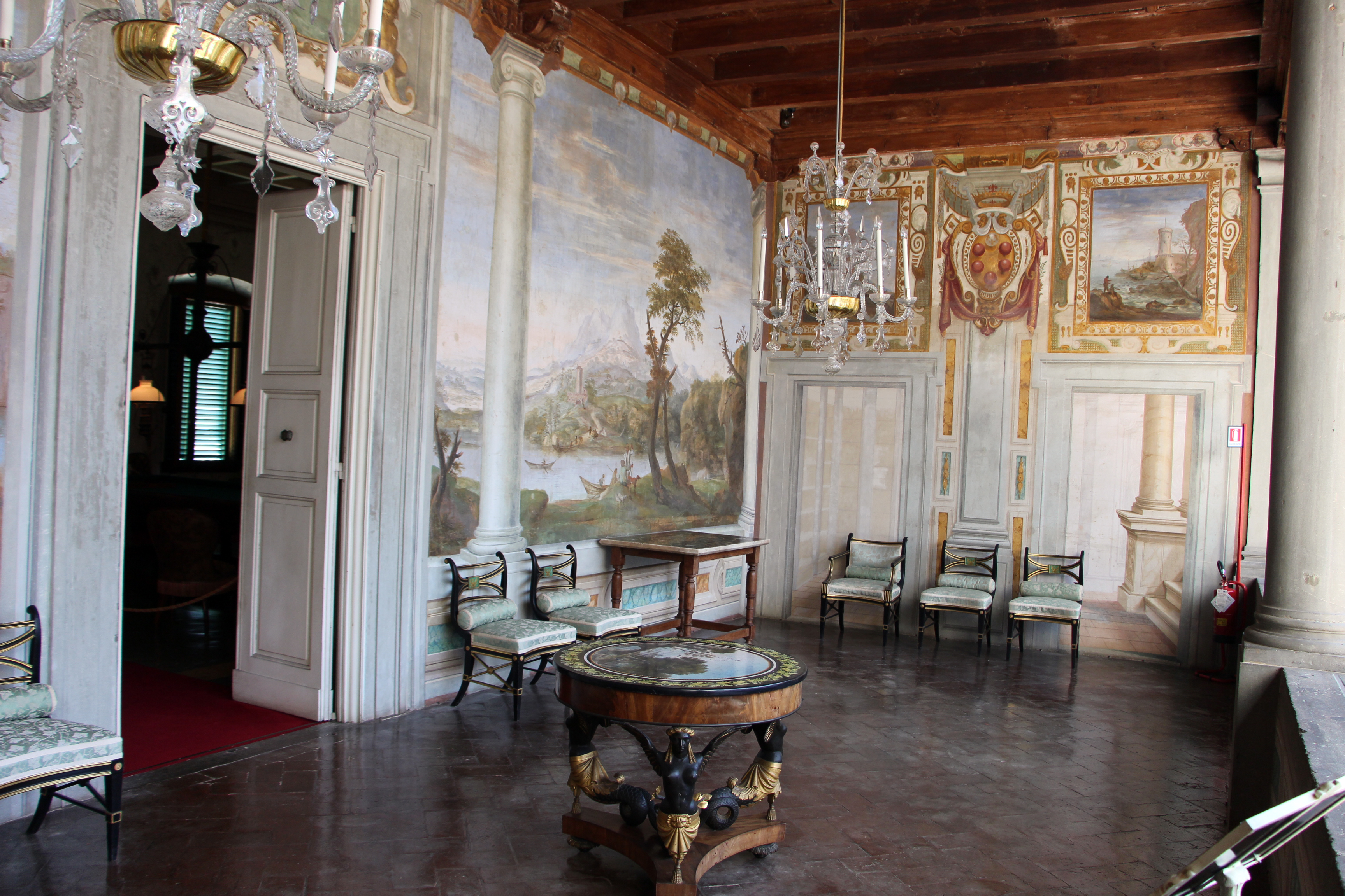 Villa medicea della Petraia - MIBAC The making of this document was supported by Wikimedia CH. (Submit your project!) For all the files concerned, please see the category Supported by Wikimedia CH. This is a photo of a monument which is part of cultural heritage of Italy.